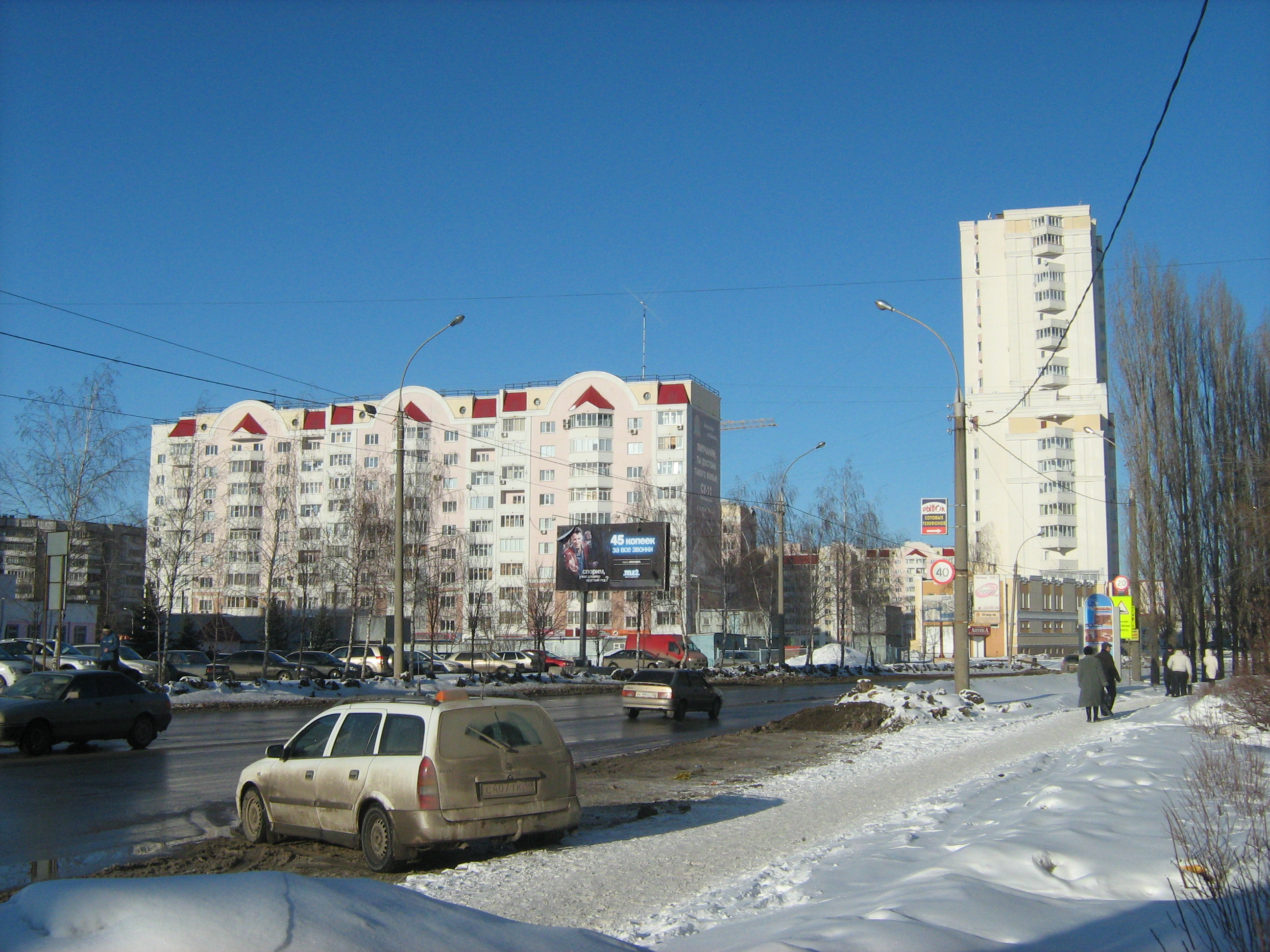 Новостройки по улице Меркулова в городе Липецк